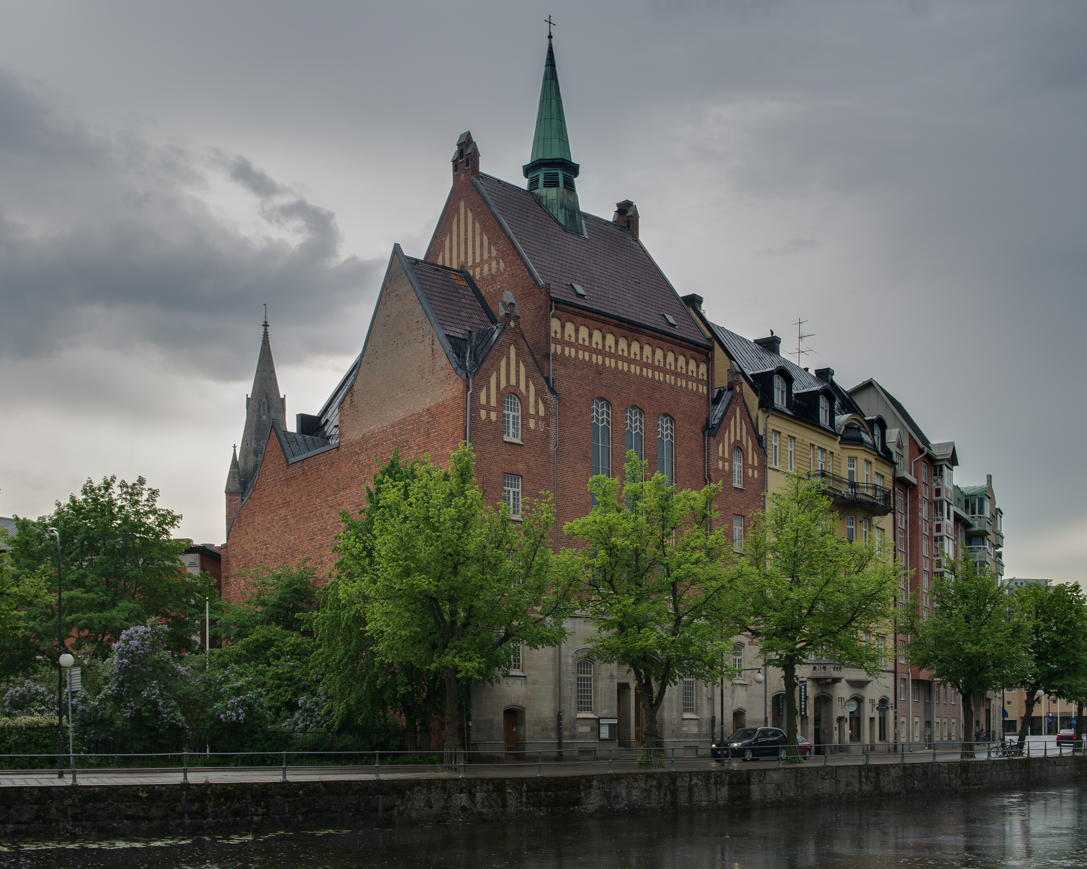 Trefaldighetskyrkan (Kv. Färgeriet 2)